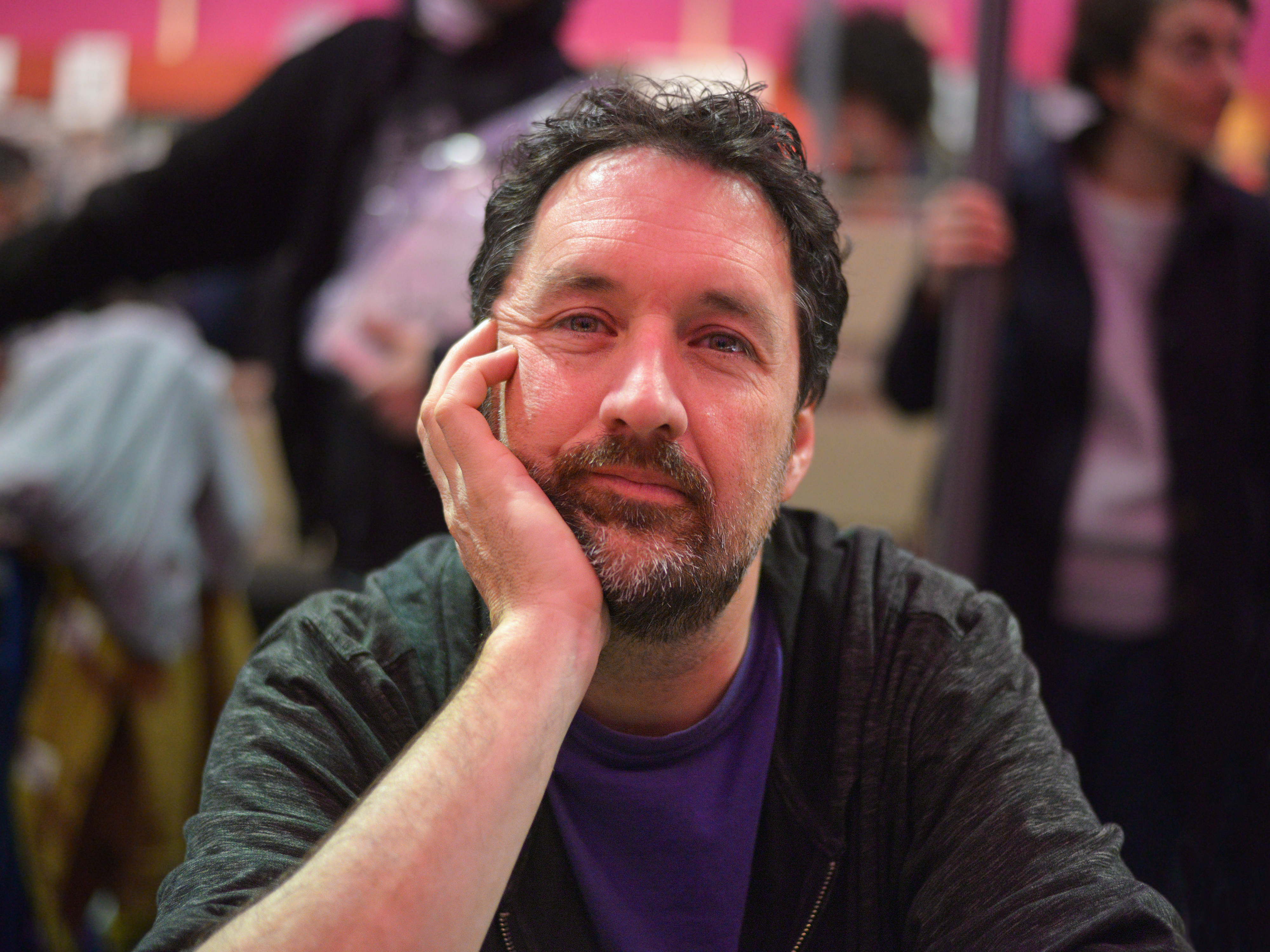 L'auteur québécois Guy Delisle sur le stand de l'Association au Festival International de la BD d'Angoulême 2015.